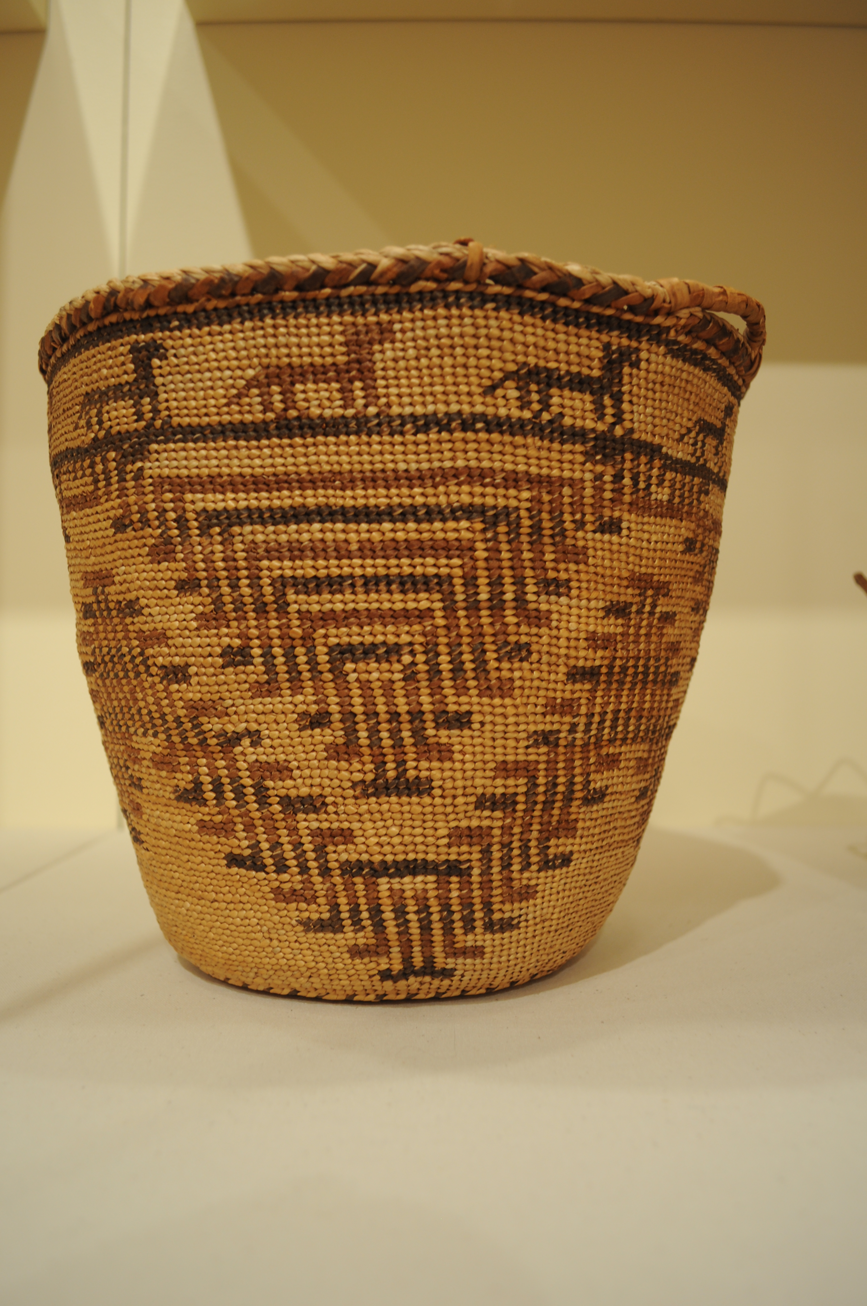 Skokomish basket